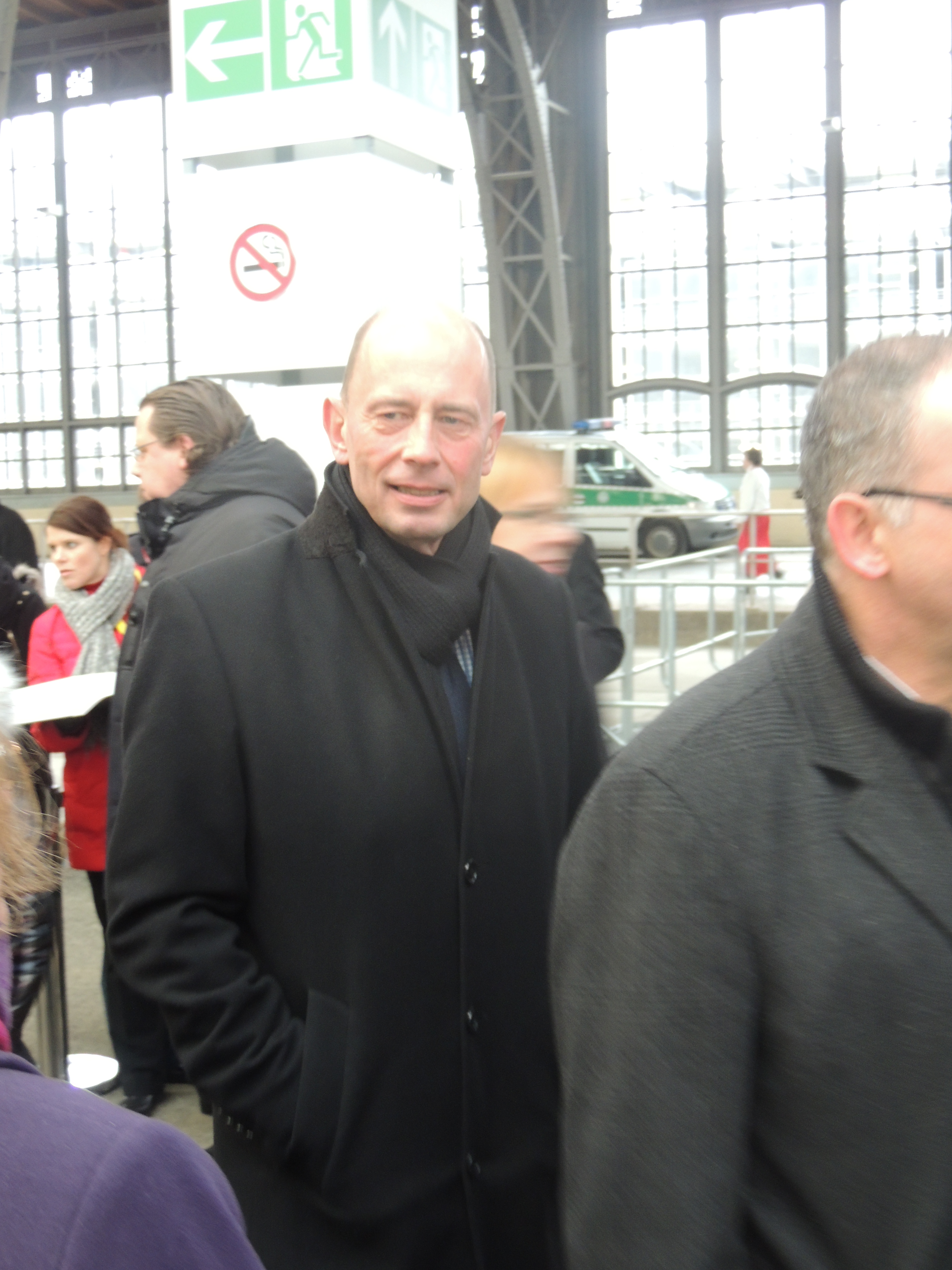 Wolfgang Tiefensee (ehemaliger Oberbürgermeister von Leipzig und Bundesminister für Verkehr, Bau und Stadtentwicklung, derzeit Bundestagsabgeordneter der SPD aus Leipzig) zur Eröffnungsveranstaltung im Leipziger Hauptbahnhof